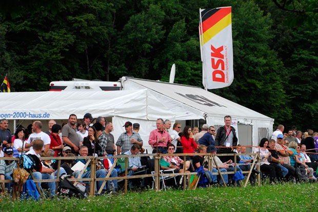 Zuschauertribüne Jopp-Kurve